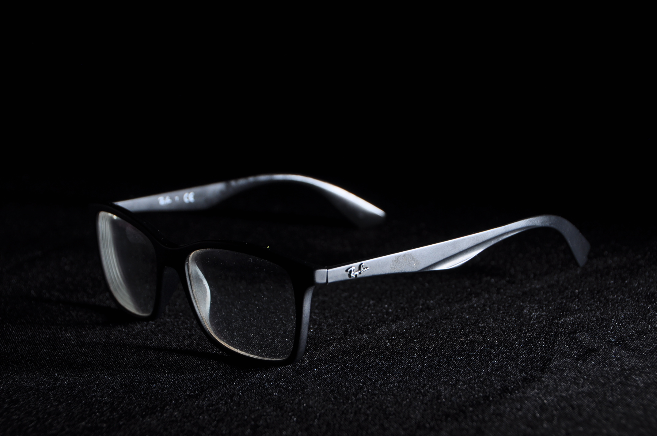 בתמונה ניתן לראות משקפי ראיה